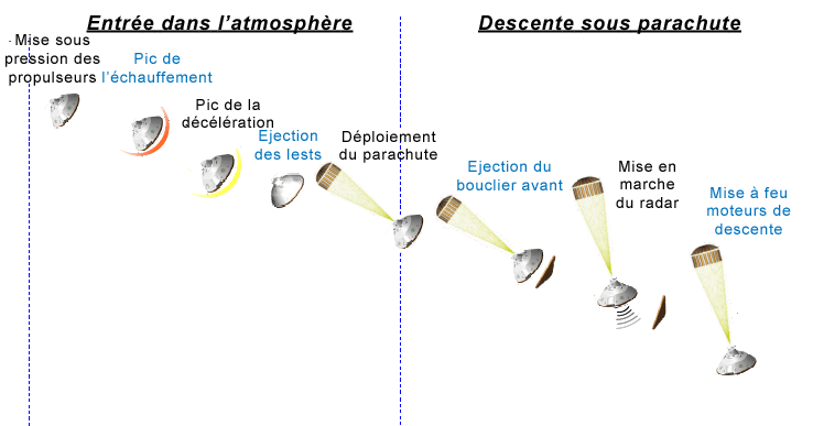 Suite de la descente sur Mars de la sonde Mars Science Laboratory